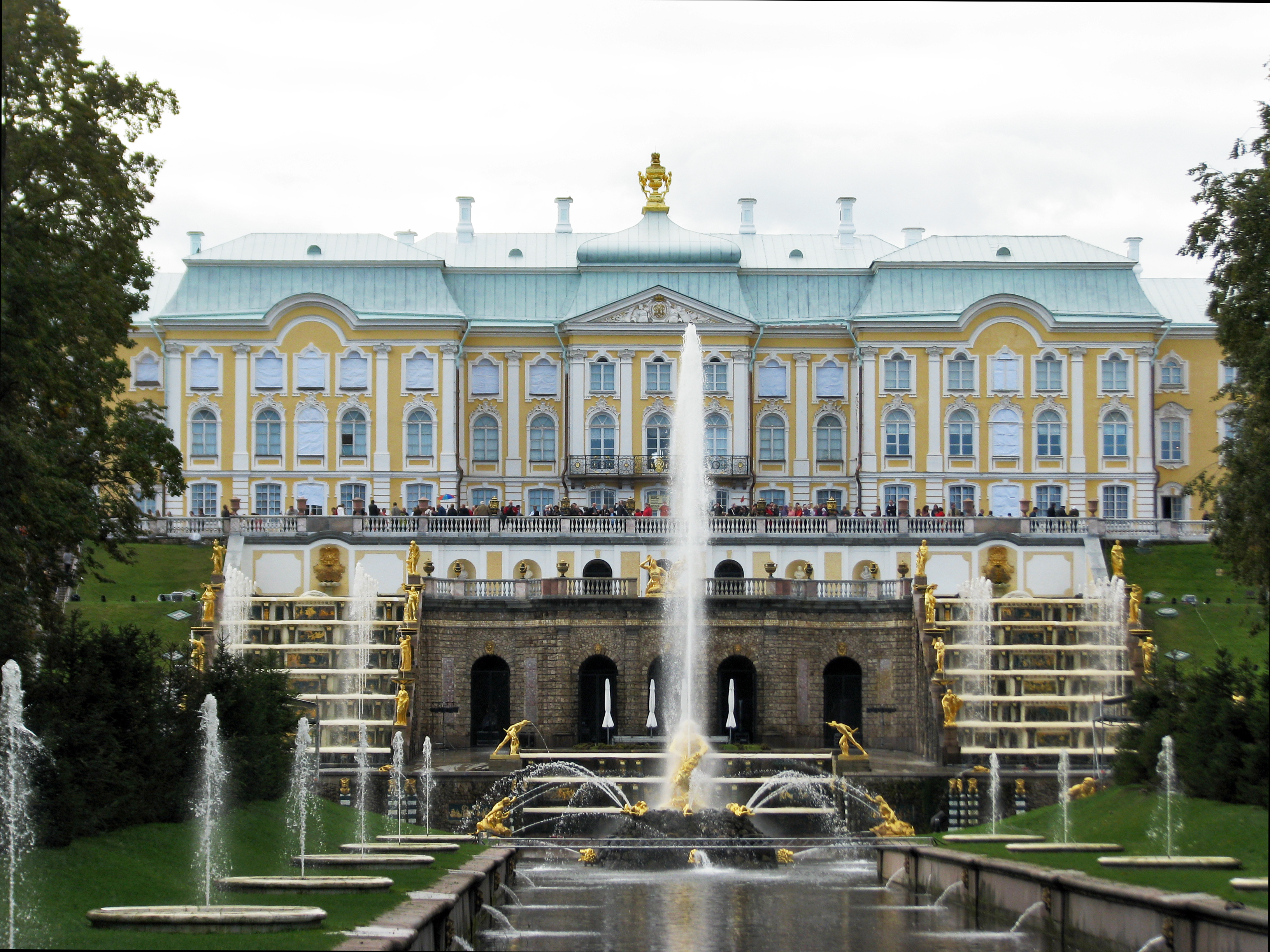 22 фонтана